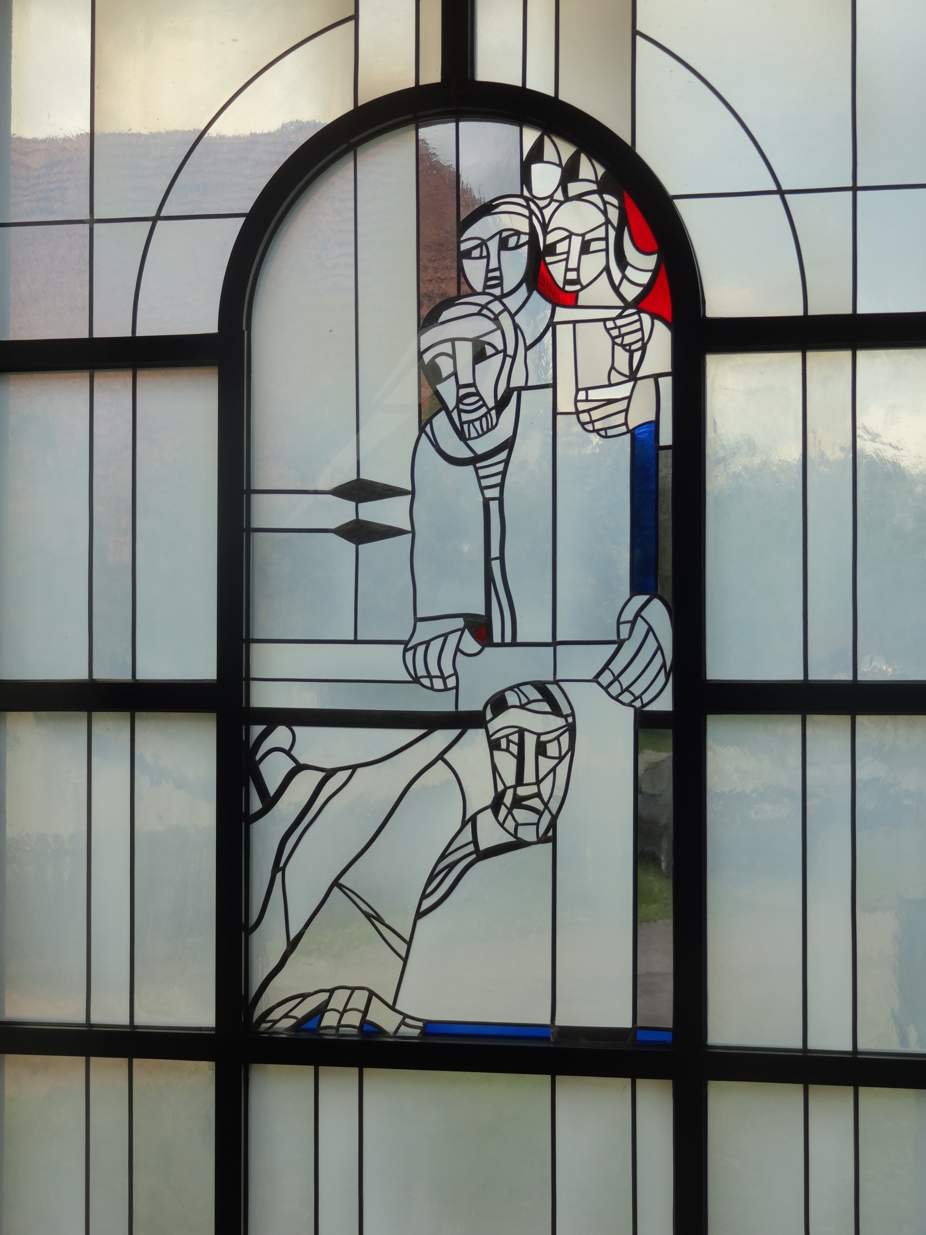 Glasgemälde in der Kirche Neu-St. Nikola in Altdorf (bei Landshut)